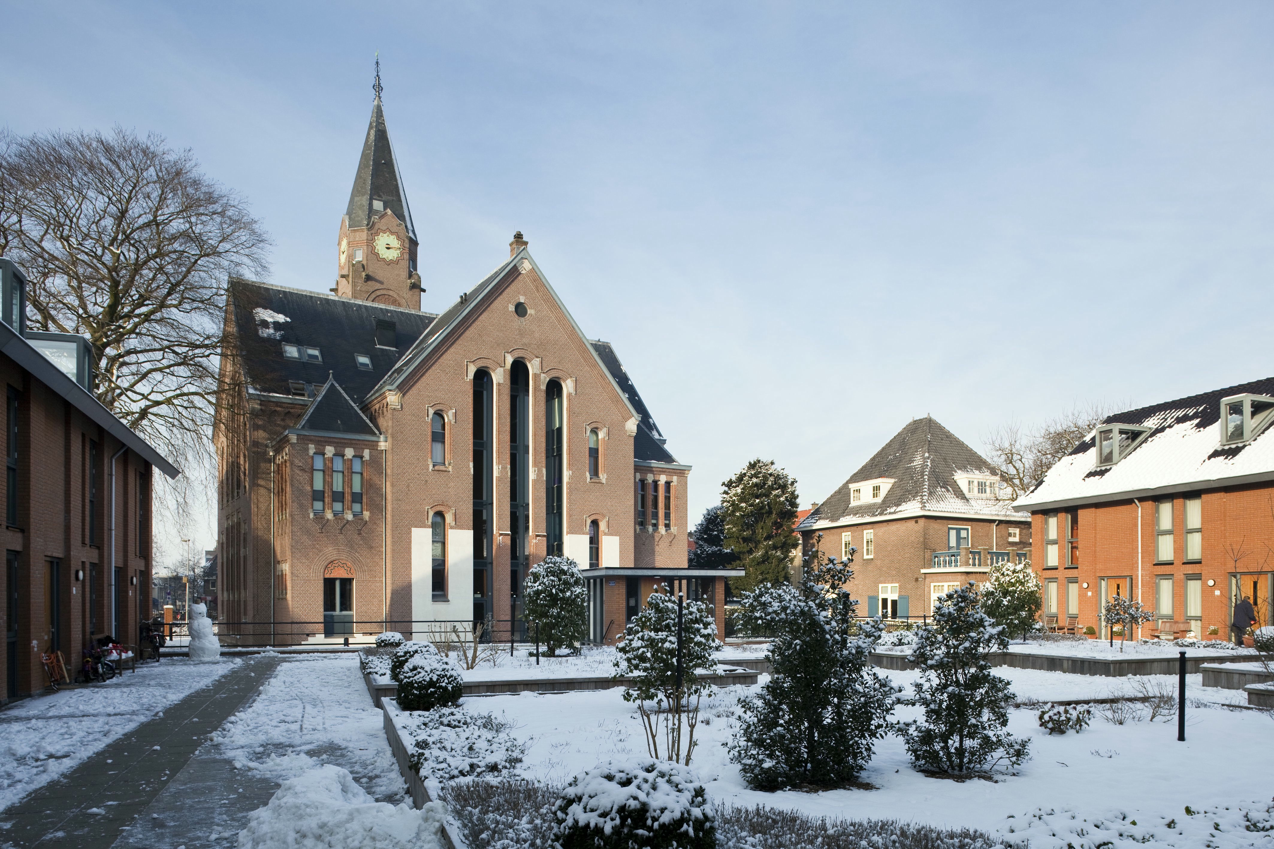 vm Vredekerk, thans appartementen: Overzicht oostgevel (opmerking: Herbestemming Kerken)